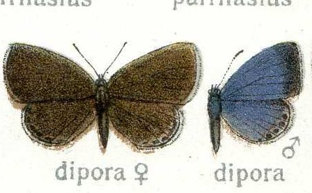 Celastrina dipora